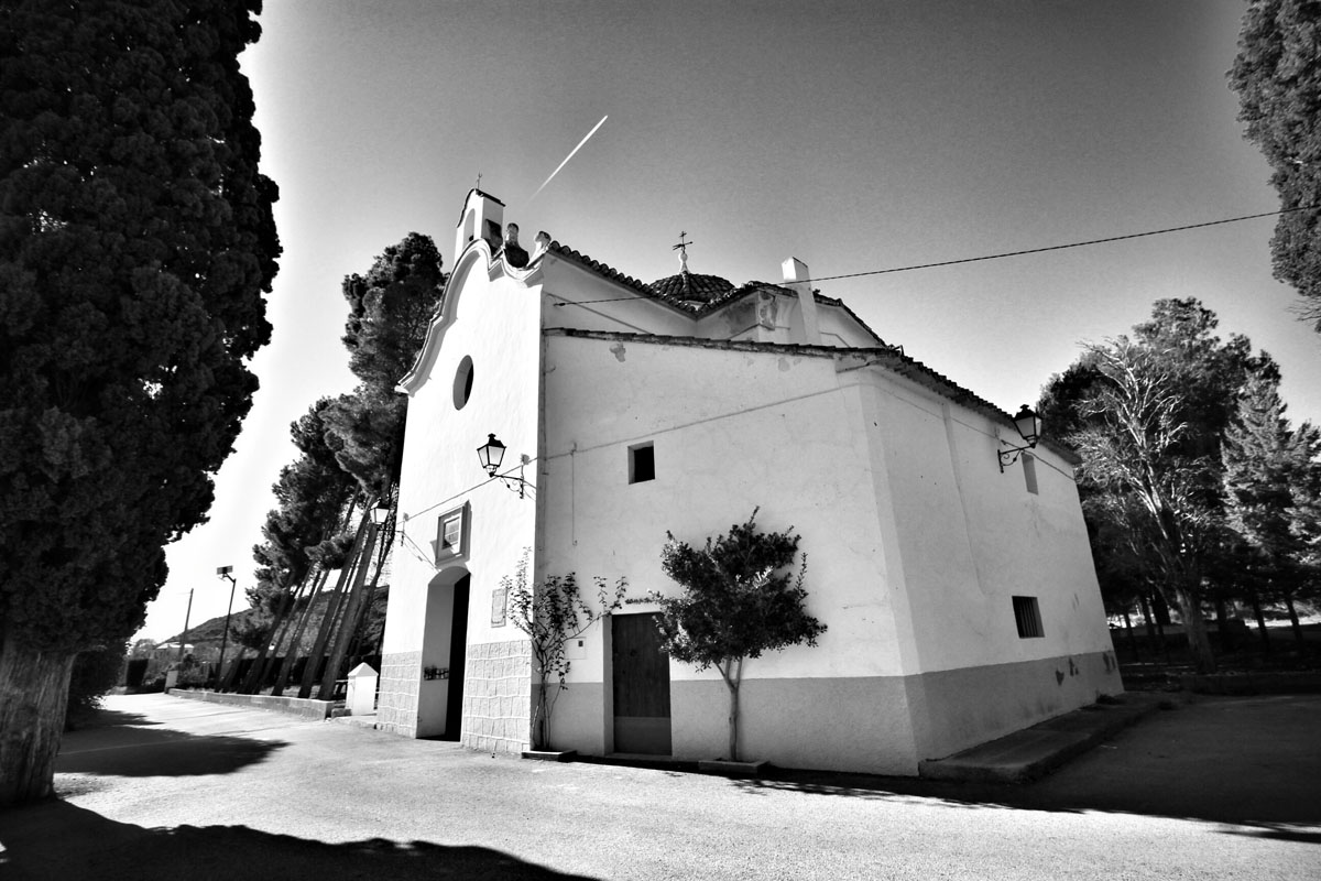 Ermita del Santo Ángel. (Imagen cedida por M. Martínez)